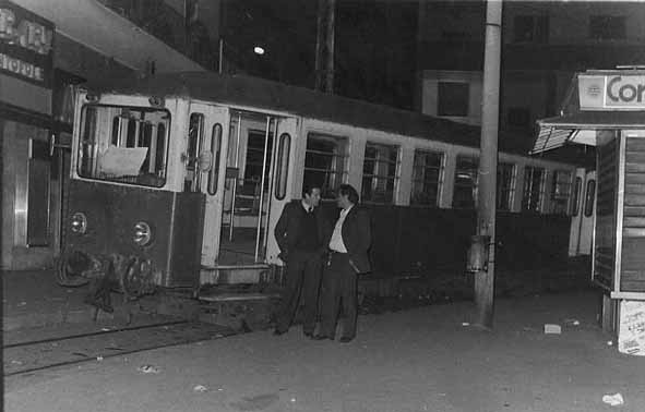 L'ultimo convoglio in servizio sulla diramazione in sosta alla fermata terminale di Piazza dei Mirti prima di ripartire alla volta di Centocelle chiudendo dietro di se una linea durata 56 anni.